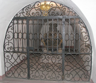 Gruft Kurfürst Carl Philipps unter der Schlosskirche in Mannheim